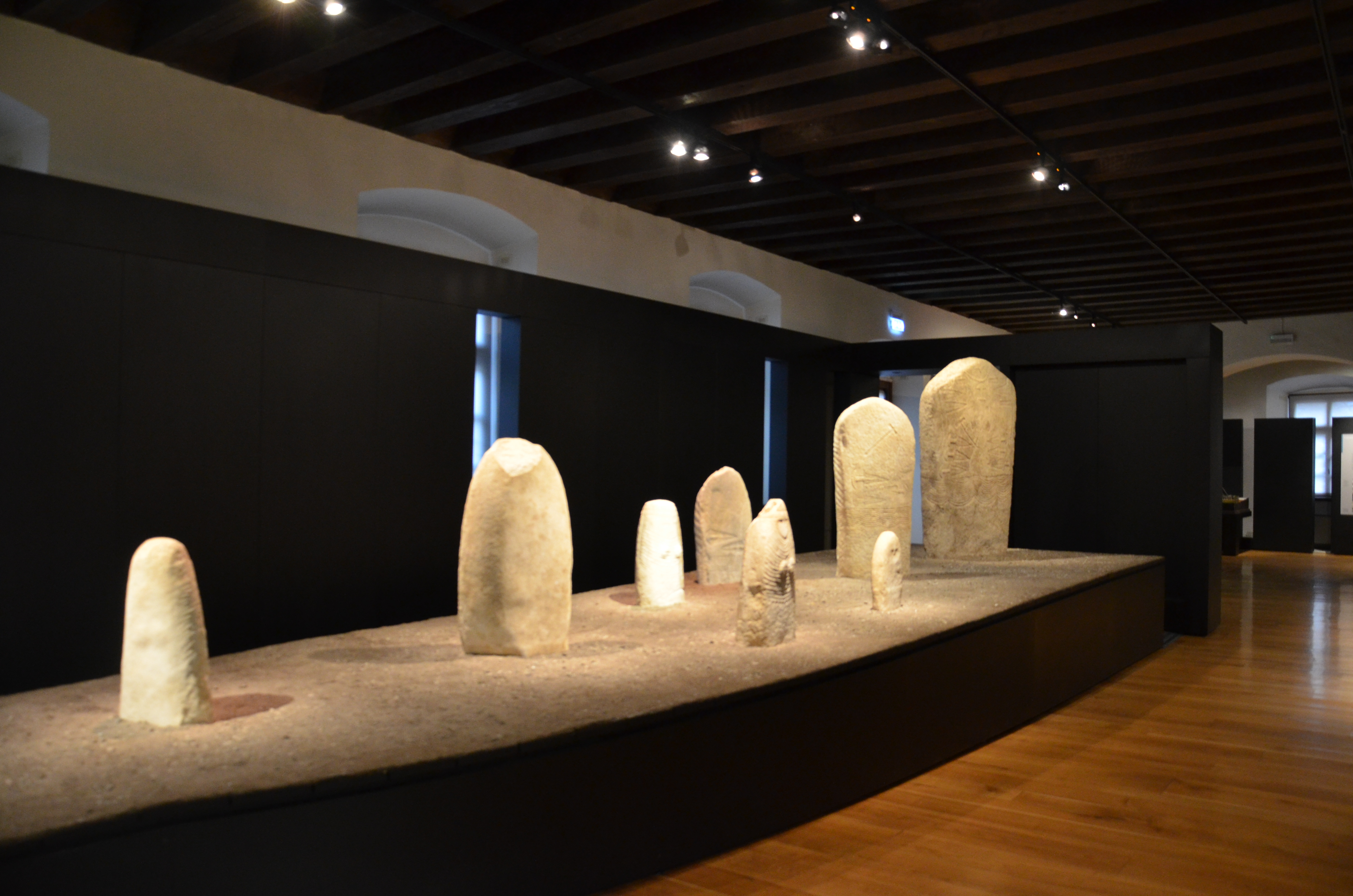 Rocca di Riva This is a photo of a monument which is part of cultural heritage of Italy.